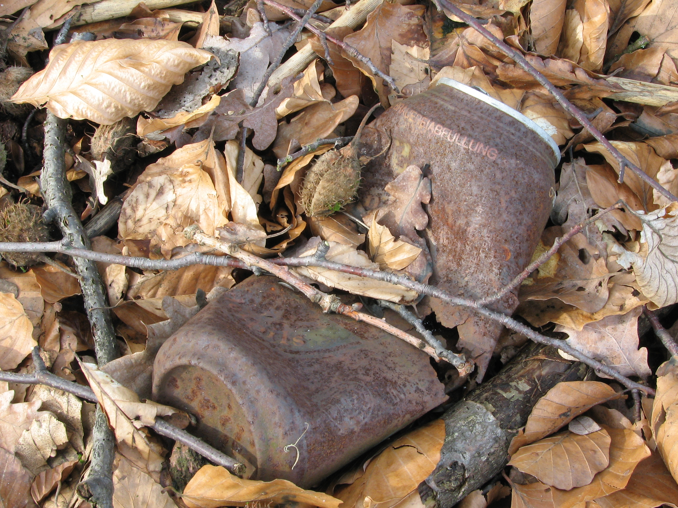 Verrottende Bierdose